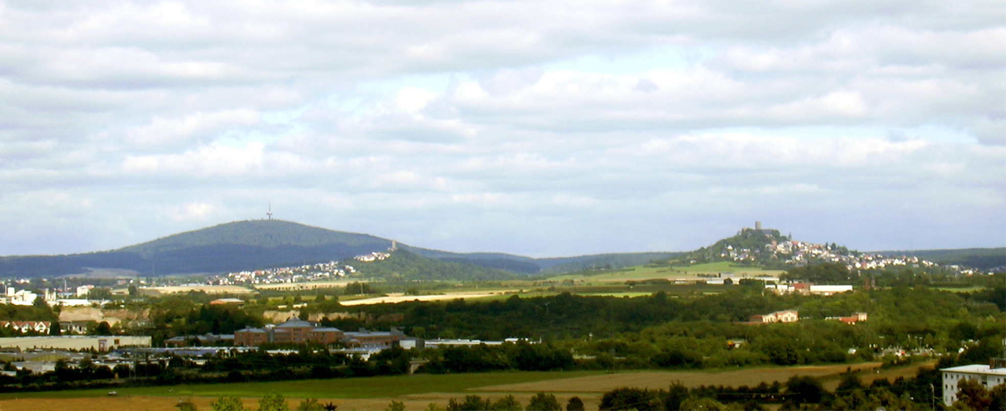 (Von links nach rechts) Dünsberg und die zwei Basaltkegel Vetzberg und Gleiberg bei Gießen.